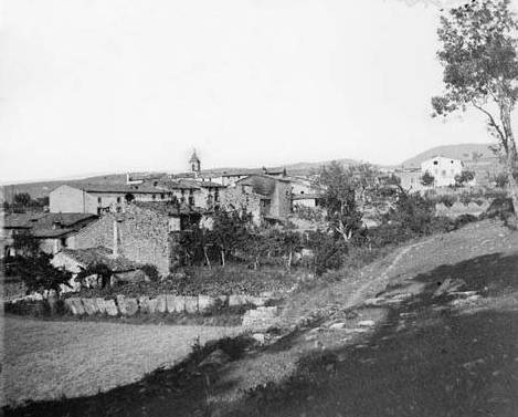 Imatge